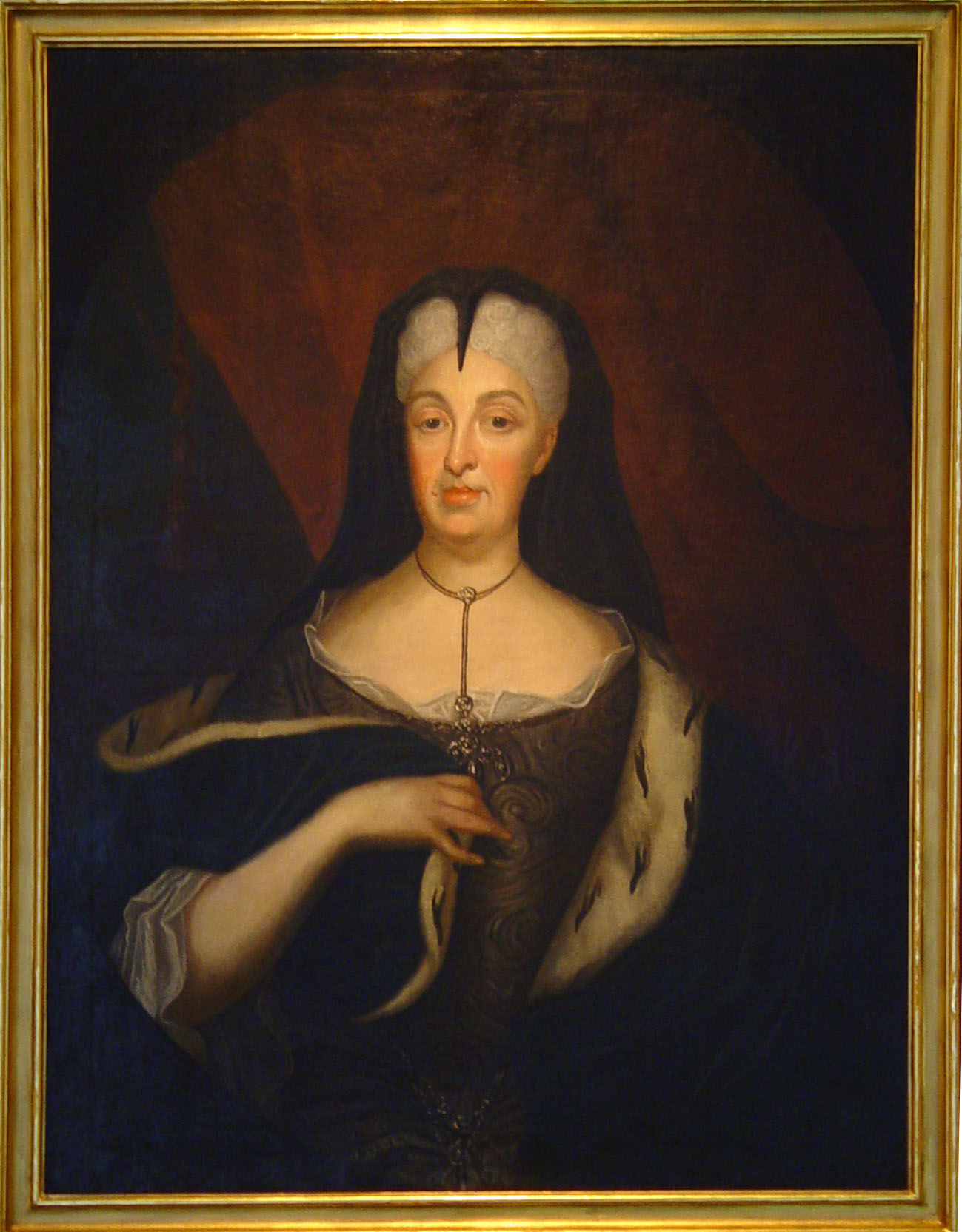 Bildnis Markgräfin Franziska Sibylla Augusta (1675–1733)